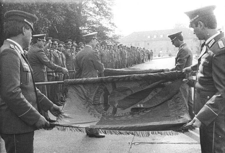 ADN-Friedrich Gahlbeck-2.10.90 Leipzig: Vereinigung. Fahnen von zwei Bataillonen der Diensteinheit Alaunwerk in Bad Düben wurden bei einem Appell am Vorabend der Übernahme durch die Bundeswehr eingerollt. Ihr zukünftiger Platz wird im Militärhistorischen Museum in Dresden sein.